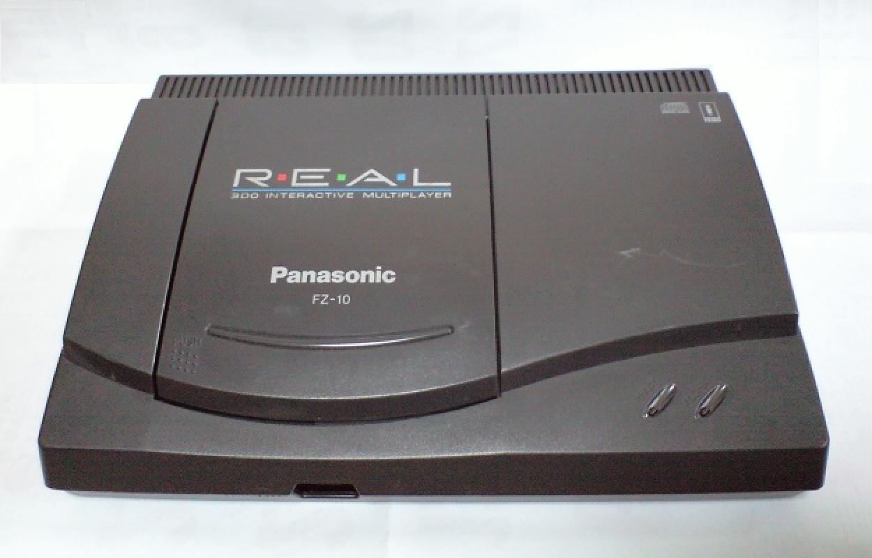 The Panasonic 3DO REAL II. A video game console only released in Japan in 1994.